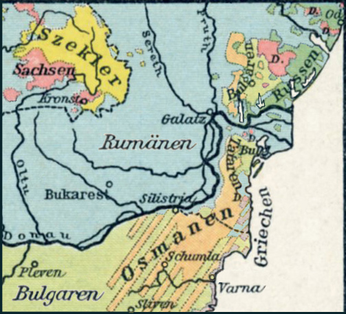 Limbile la Dunărea de Jos, hartă germană din 1895 (după datele recensământului otoman din 1850) extrasă din Andrees Allgemeiner Handatlas, ed. Velhagen & Klasing, Bielefeld și Leipzig